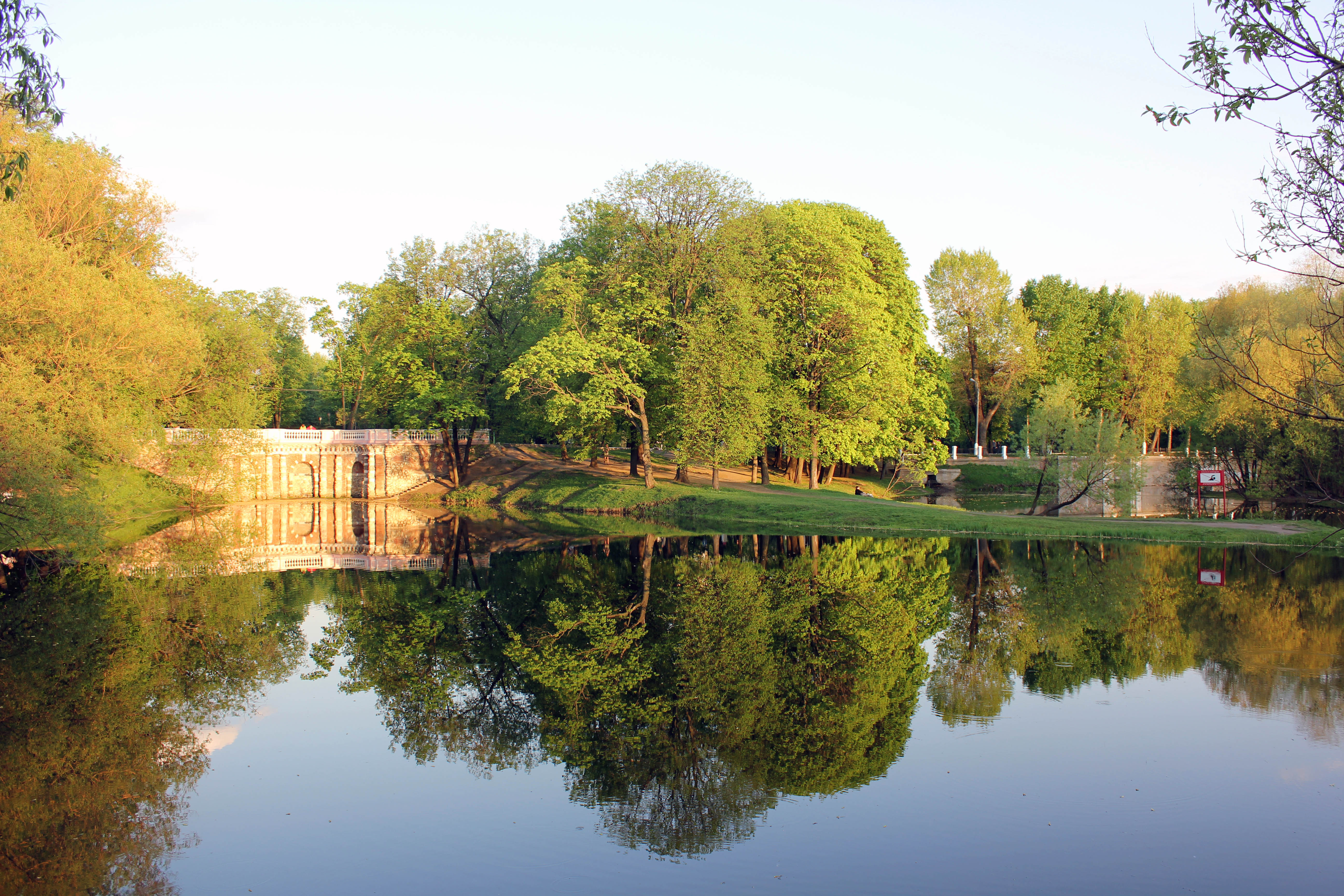 Лефортовский парк, Юго-Восточный округ This image is related to the protected area of Russia number 7710451